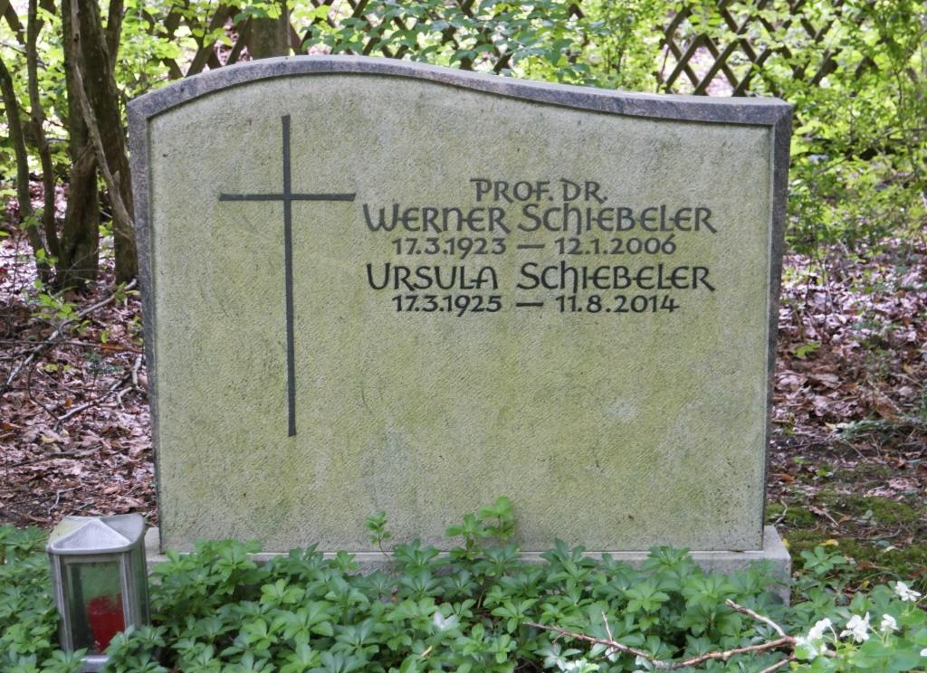 Grab des Physikers und Parapsychologen Werner Schiebeler, 1923-2006, auf dem Waldfriedhof in München-Solln